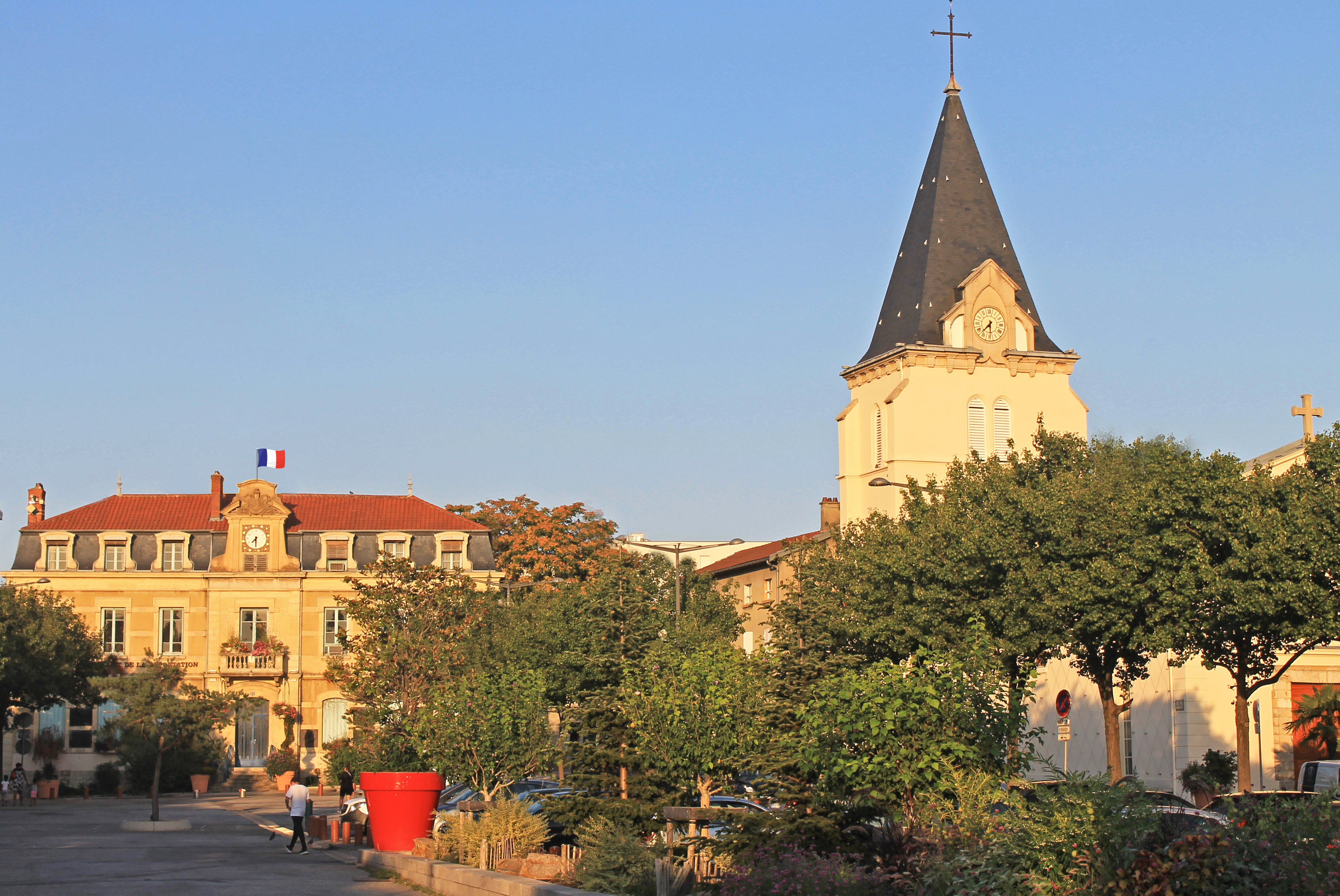 L'église Saint-Germain et l'ancienne mairie sur la place Léon Sublet, au coeur de Vénissieux-village.